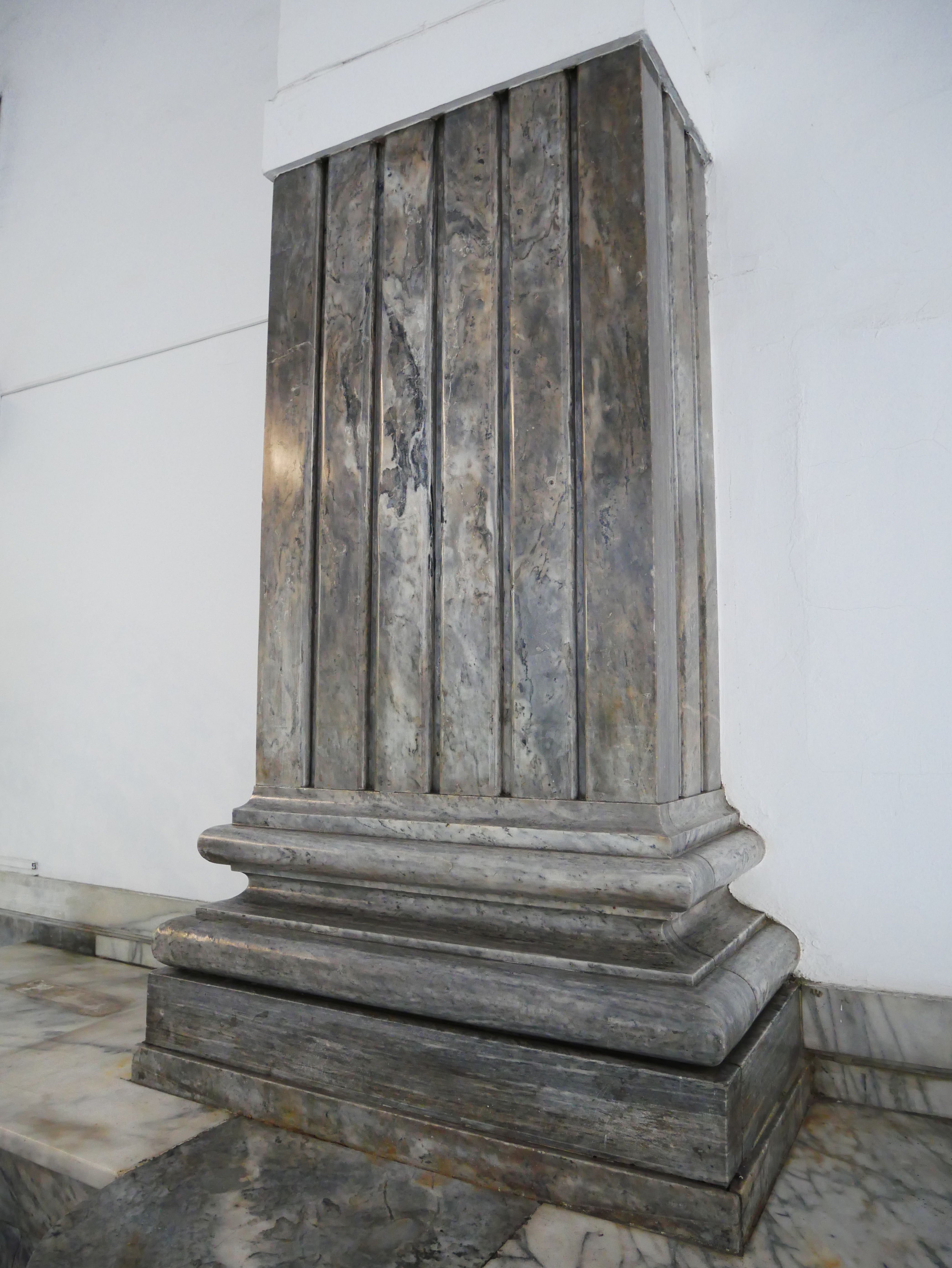 臺北郵局大廳大理石壁飾，臺北市中正區城內次分區光復里